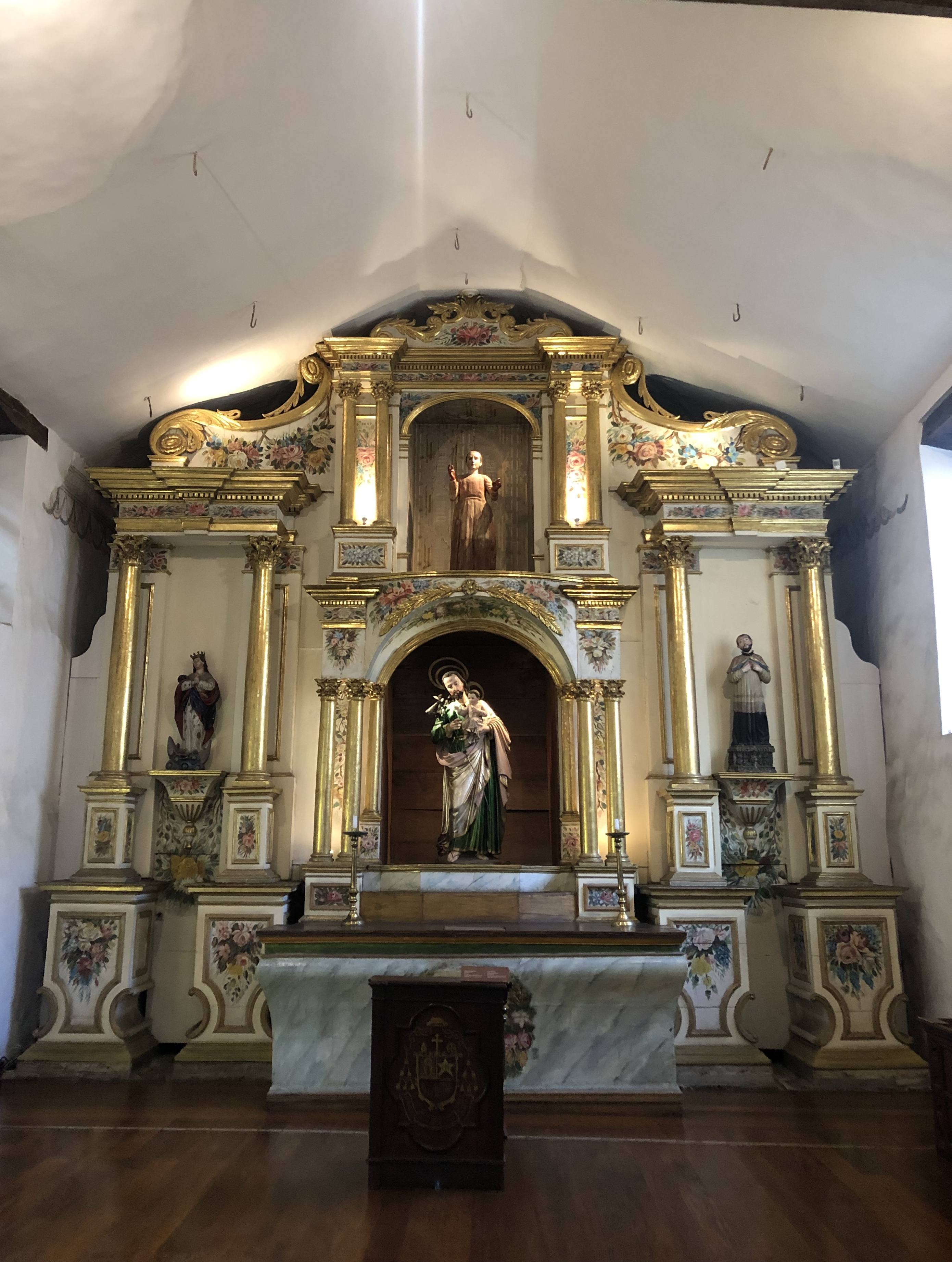 En ésta imagen se aprecia el altar dedicado a San Pedro en la Catedral Vieja de Cuenca